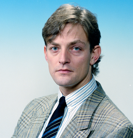 Job Frieszo